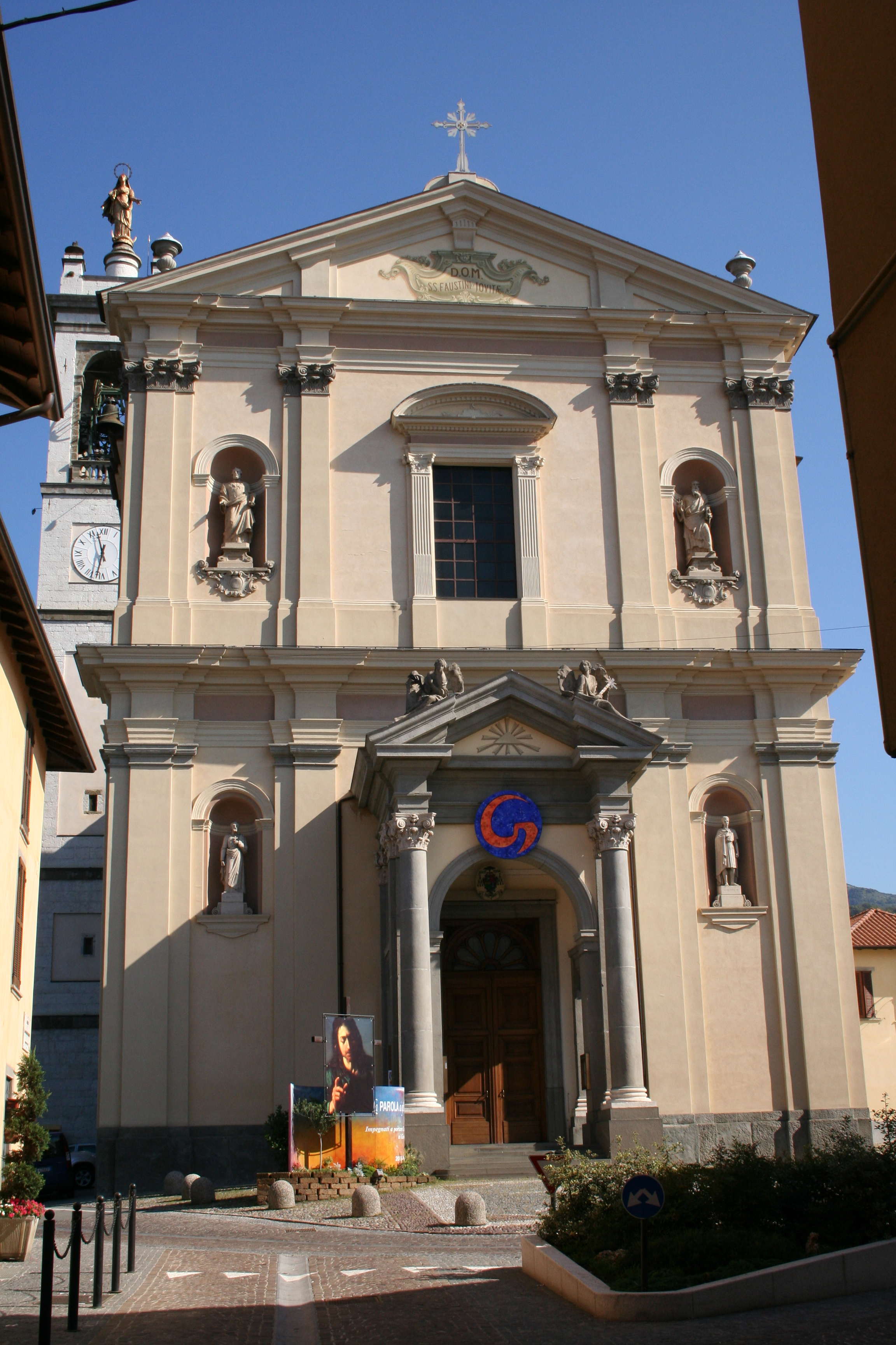 Autore Giorces. Villa d'Almè, la Parrocchiale.